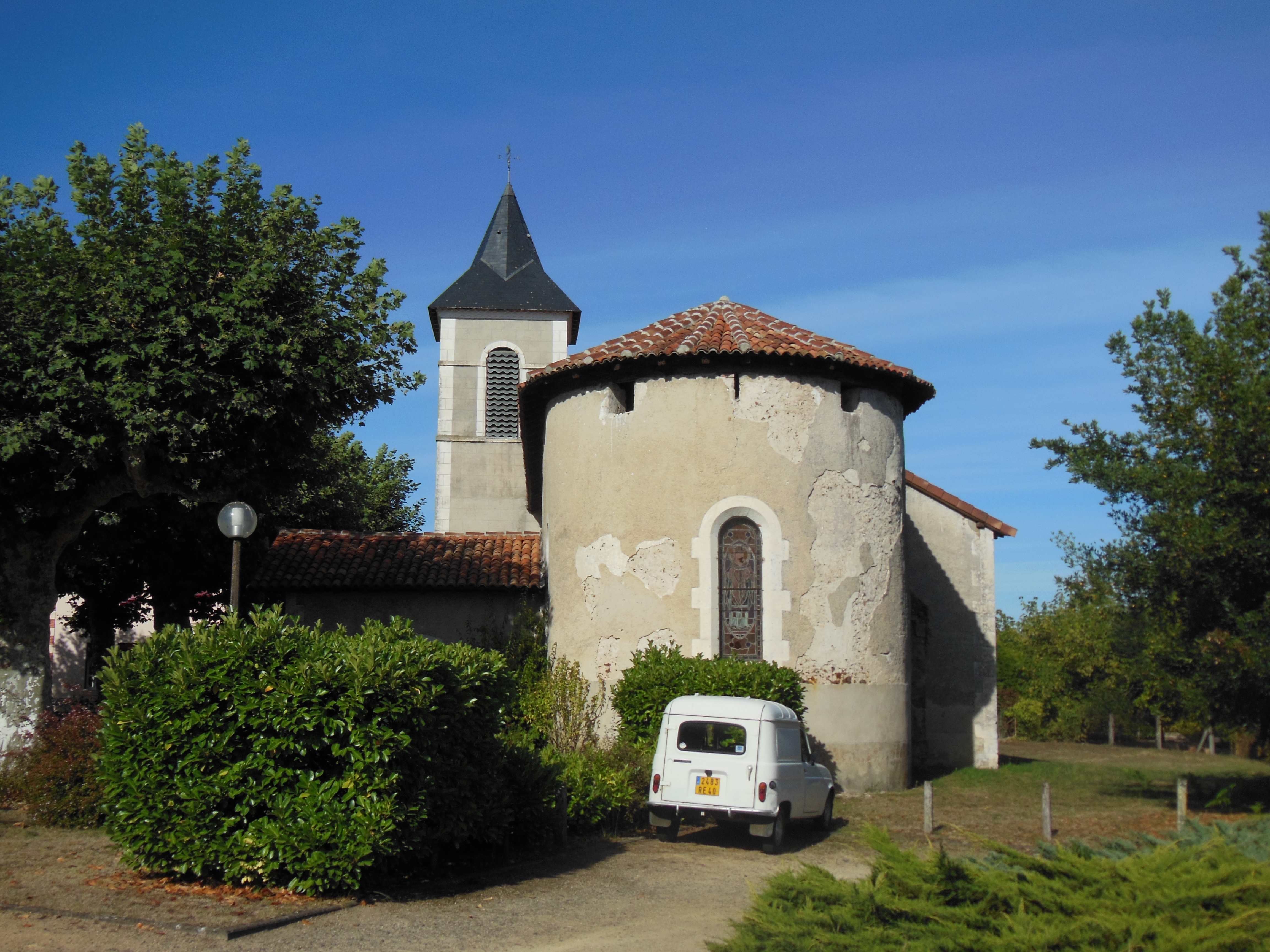 Église Saint-Martin de Garrosse, dans le département français des Landes